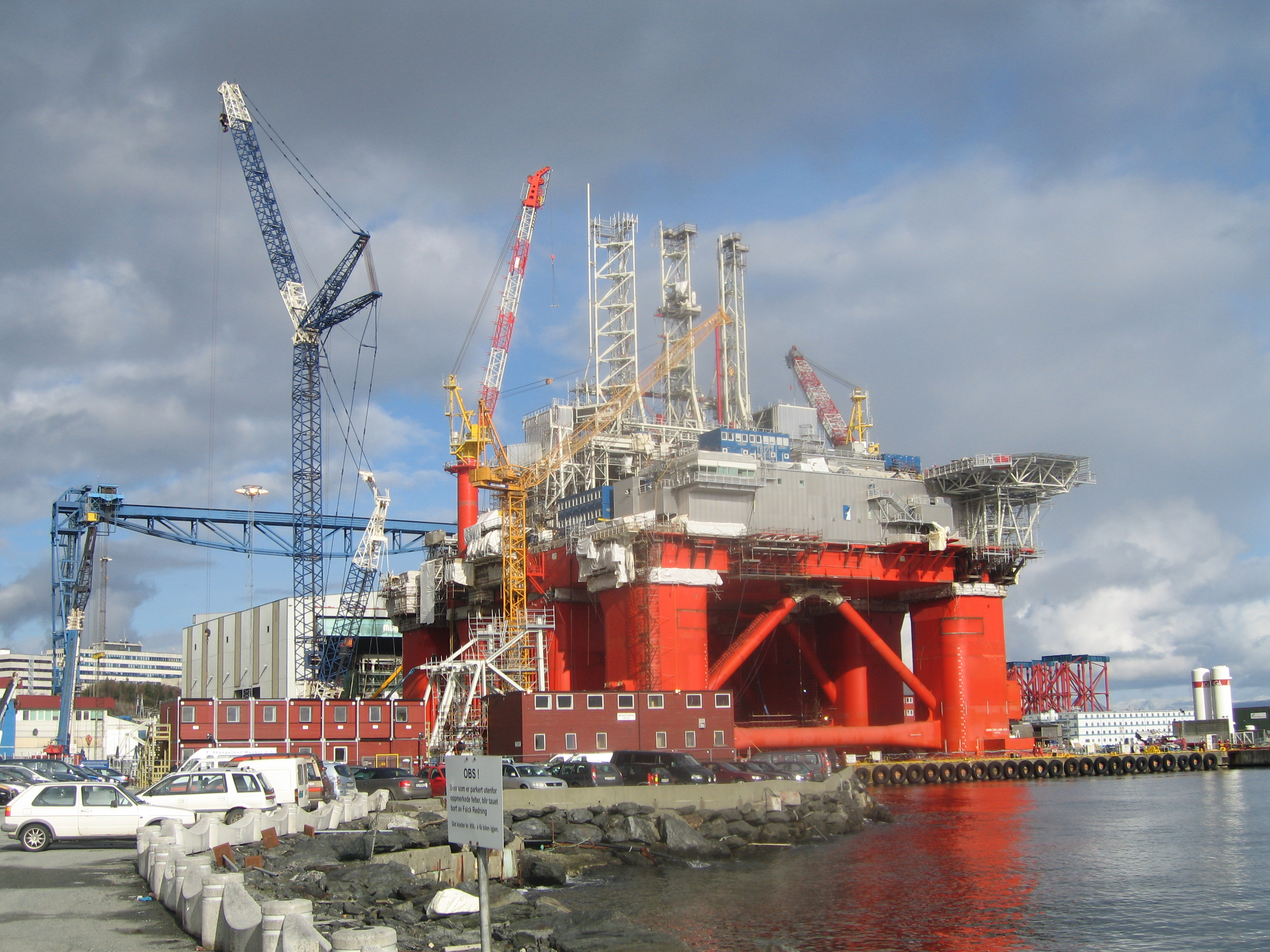 H6e-riggen «Aker Spitsbergen», bygd for Aker Drilling ved Aker Kværner Stord